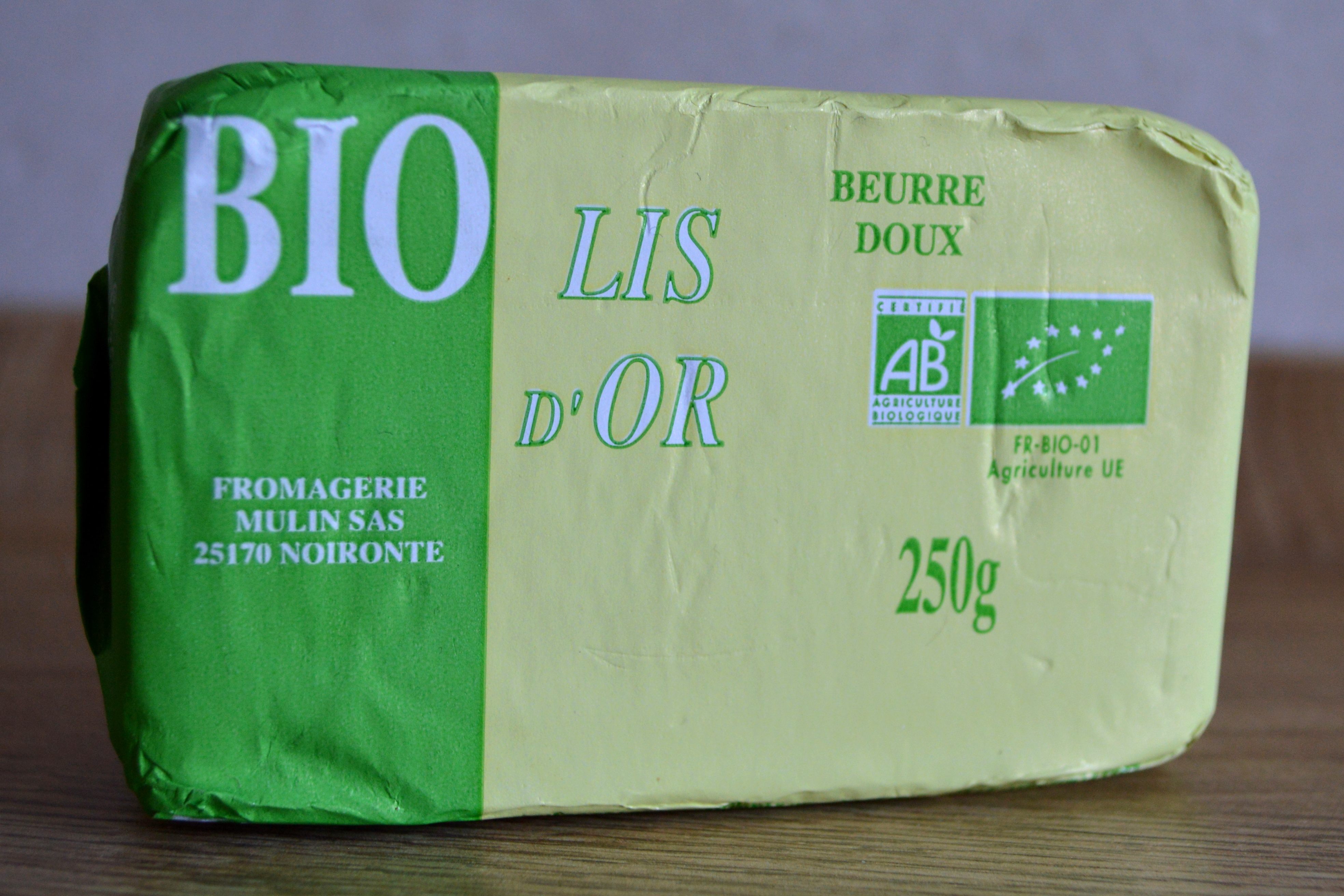 Plaquette de beurre biologique d'un poids de 250 grammes de la marque Lis d'Or produit par la fromagerie Mulin de Noironte, dans le département français de Doubs.